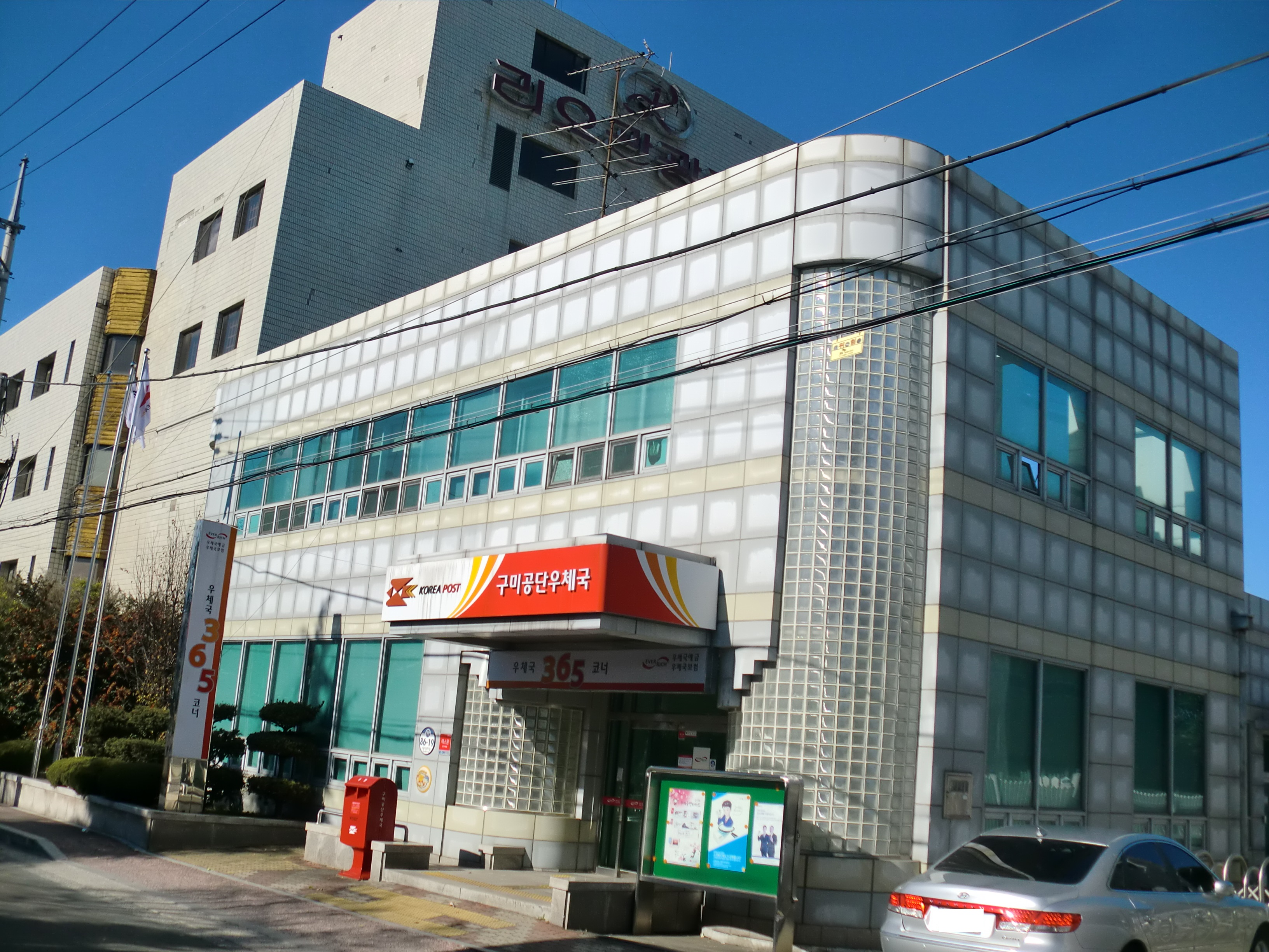 경상북도 구미시에 있는 구미공단우체국